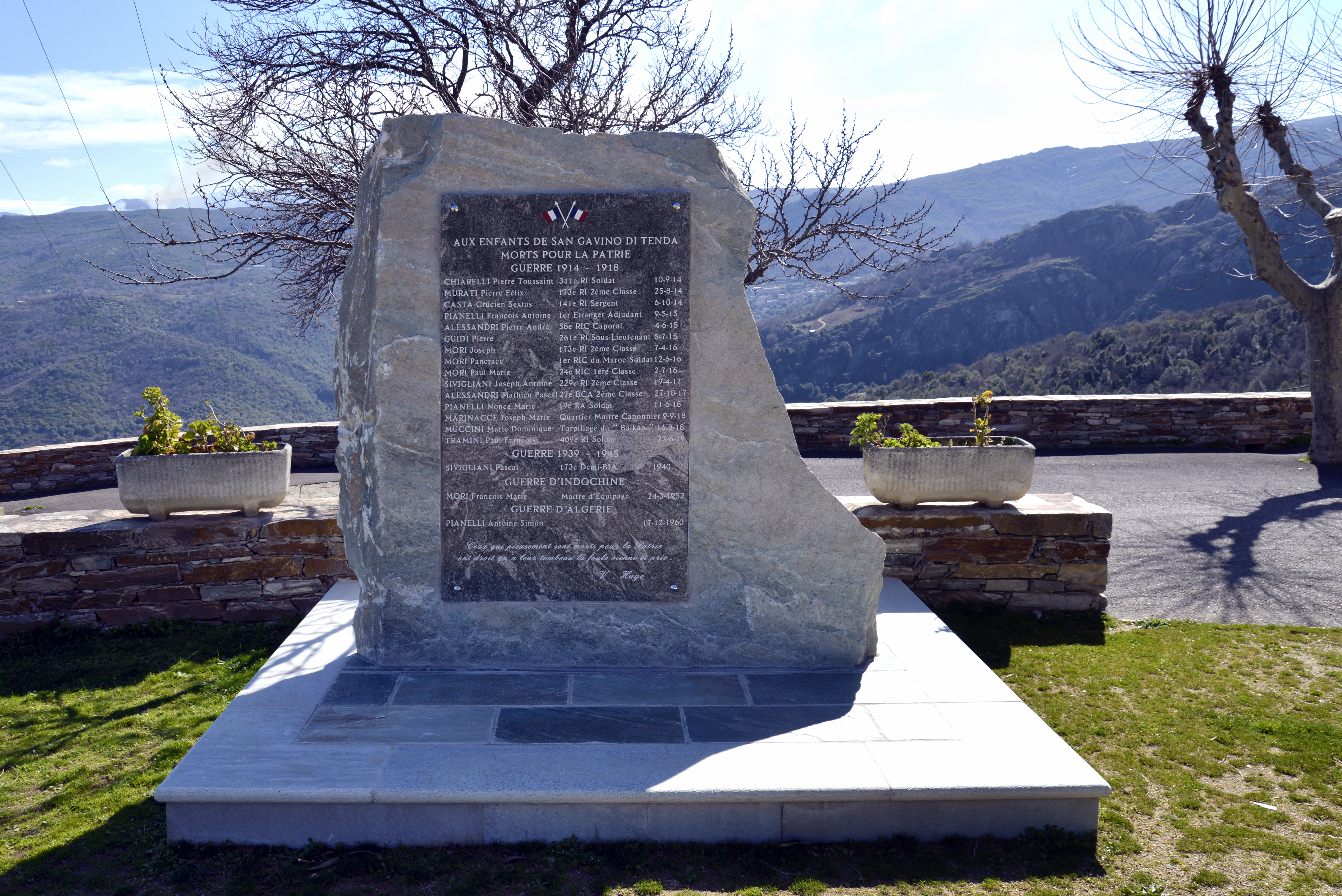 San-Gavino-di-Tenda, Nebbio (Corse) - Monument aux morts, place de l'église